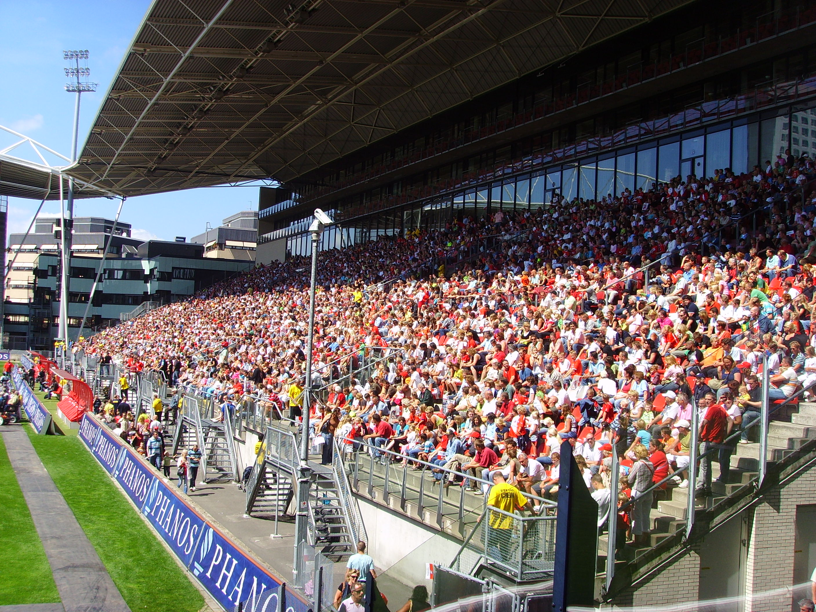 Tribune van Stadion Galgenwaard tijdens de Open Dag 2007